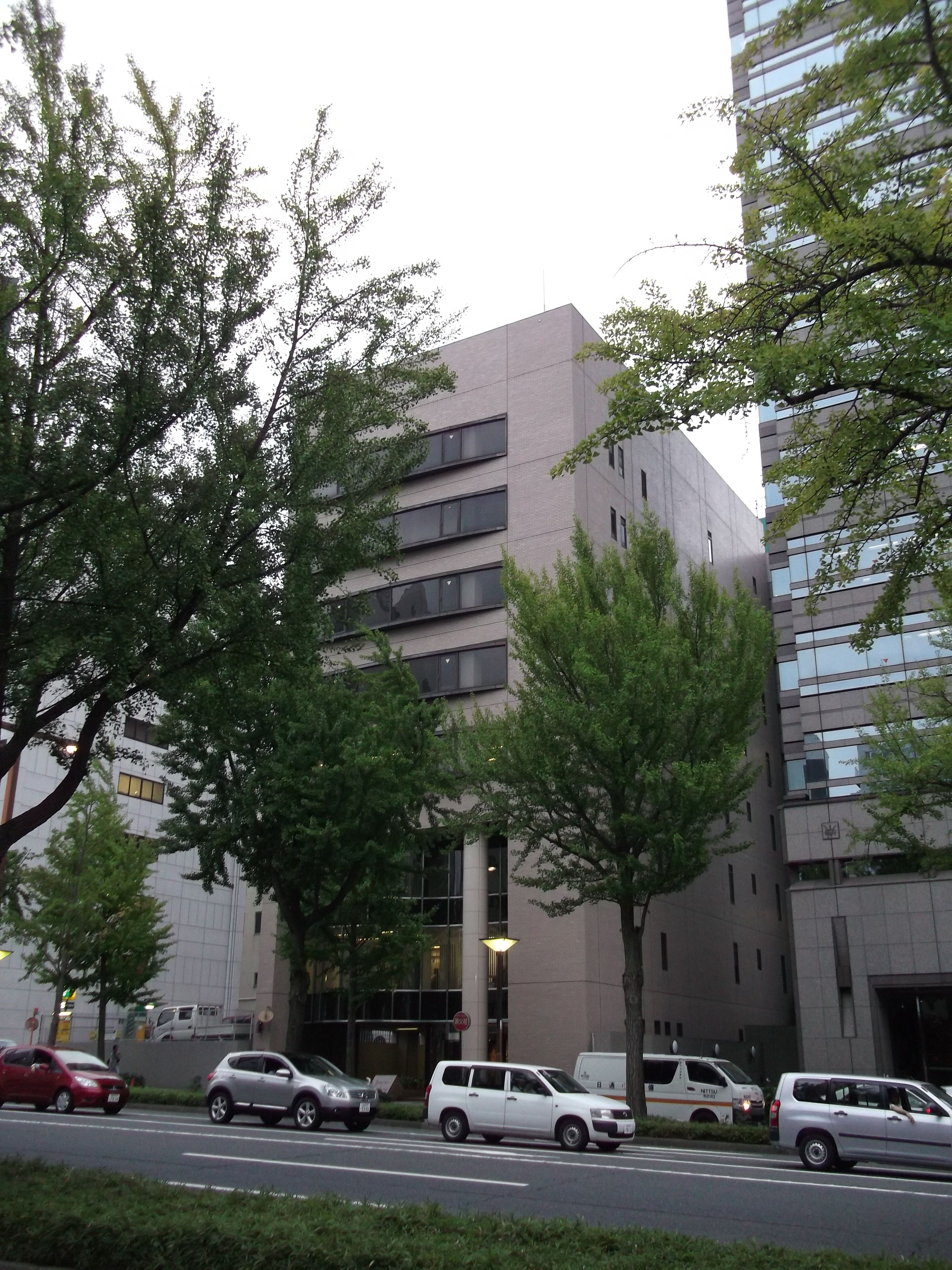 名古屋市中区の天野エンザイム本社を北側公道（桜通）西側より撮影